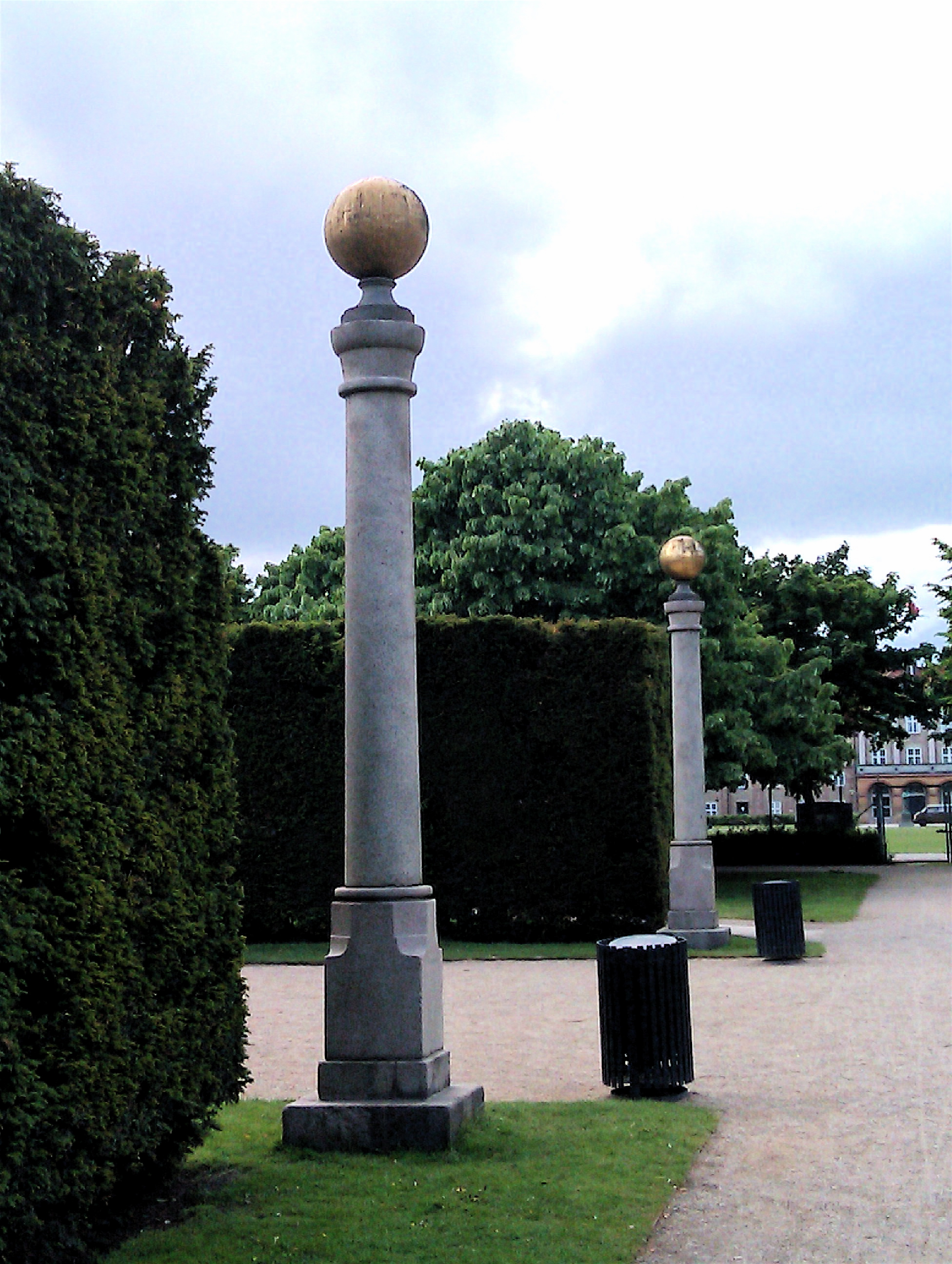 Ringrendingssøjlerne i Kongens Have, trolig fra Christian IVs tid (1588-1648), København